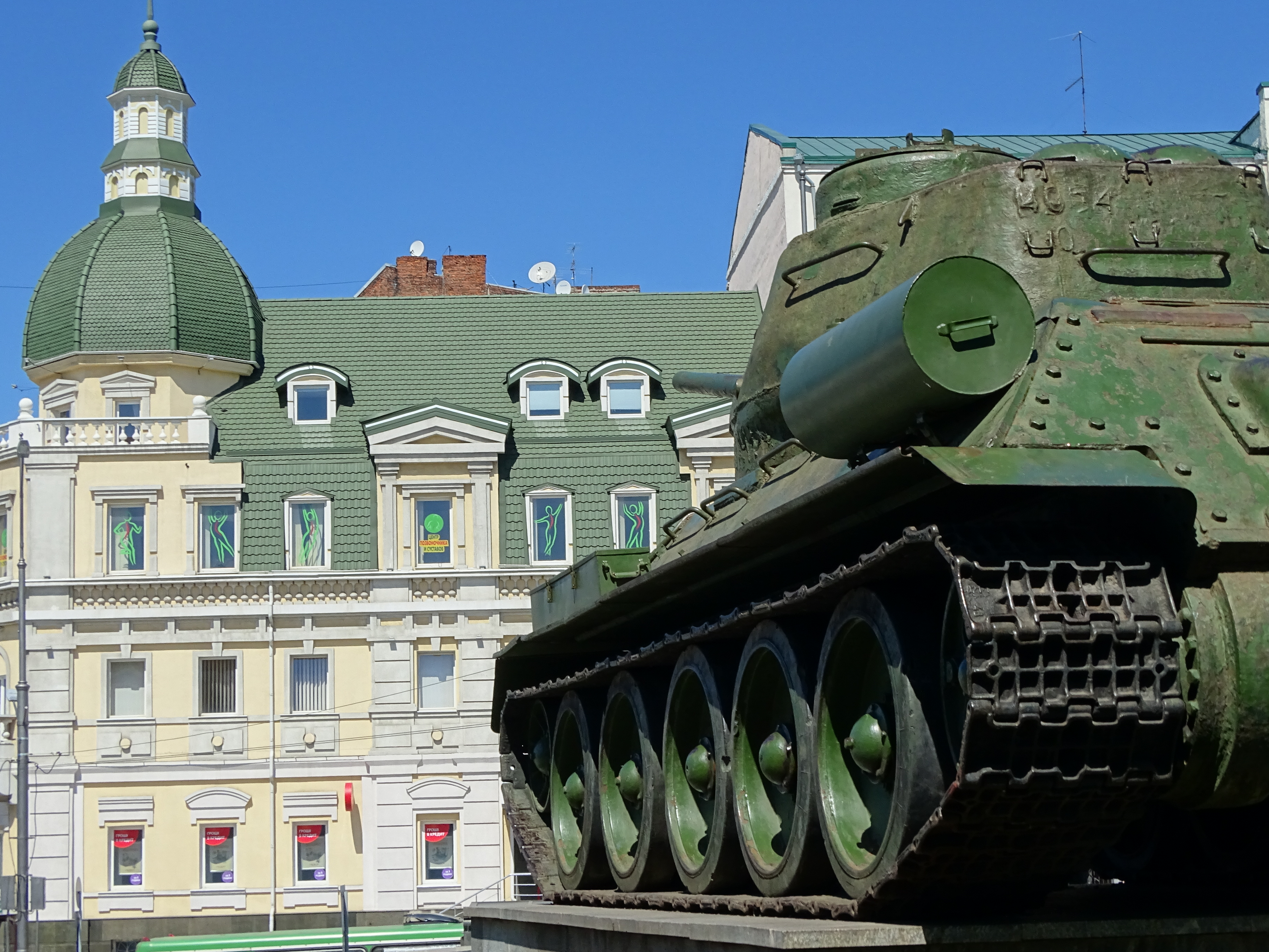 T-34 Tank outside Historical Museum - Kharkiv (Kharkov) - Ukraine